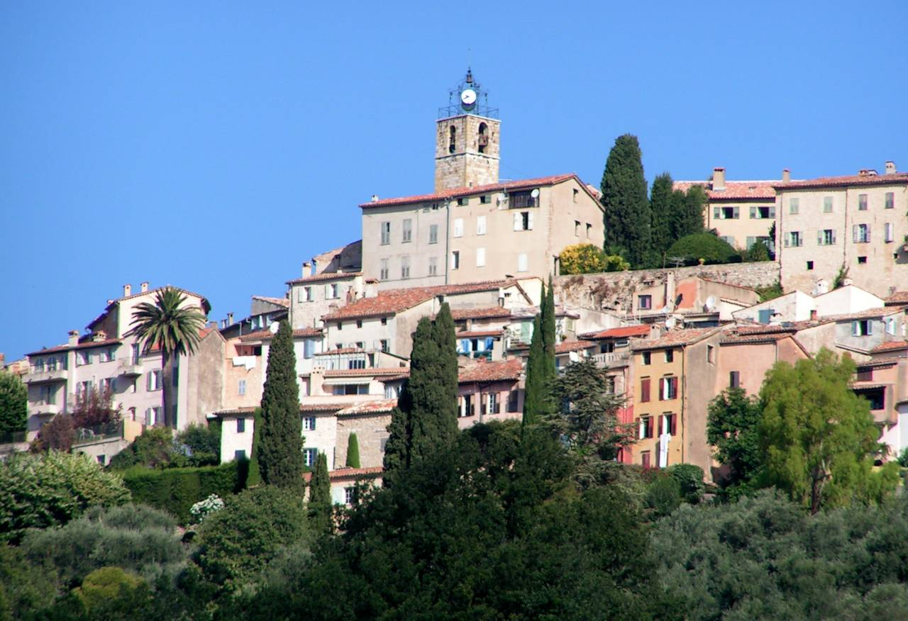 Châteauneuf-Grasse Village.